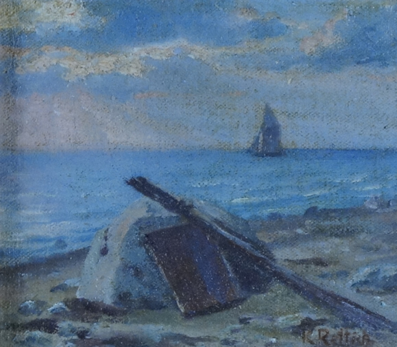 Segler vor der Küste. 12 x 15 cm